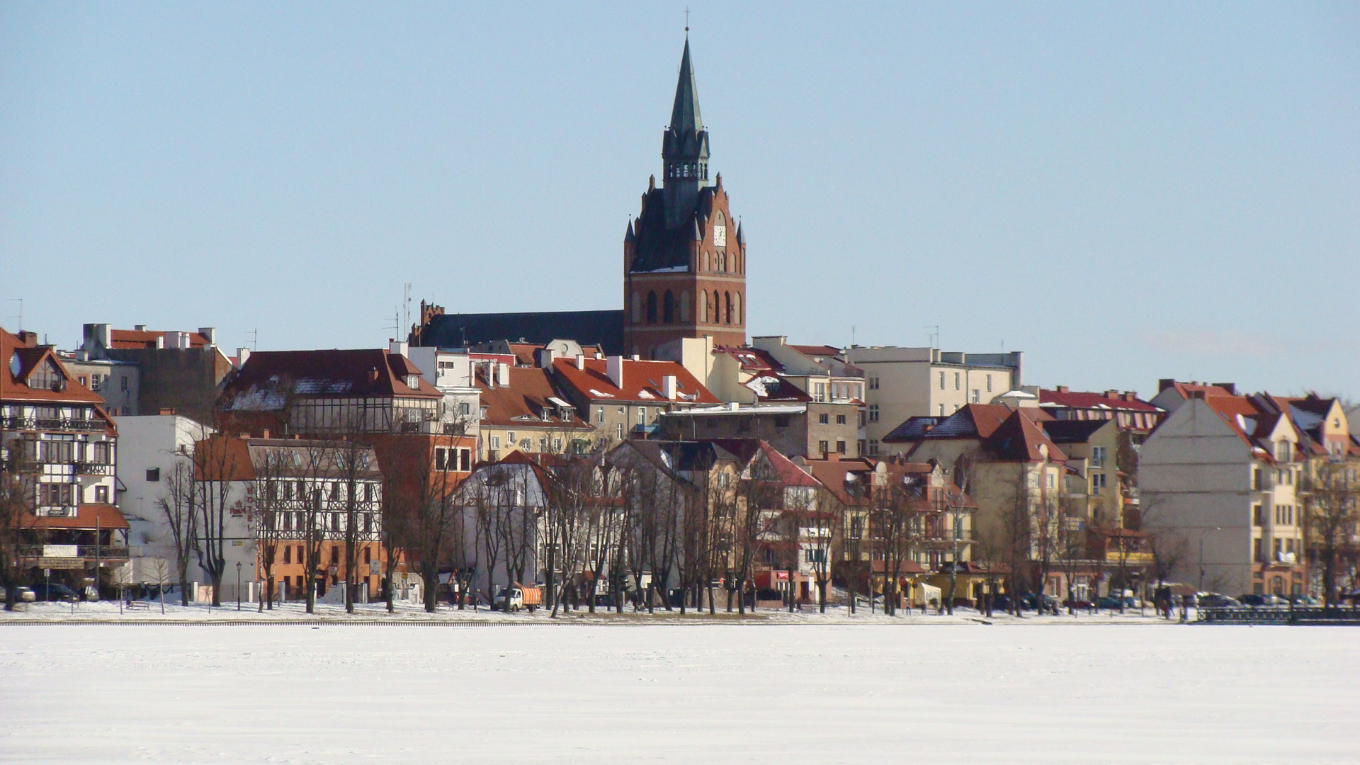 Ełk - panorama